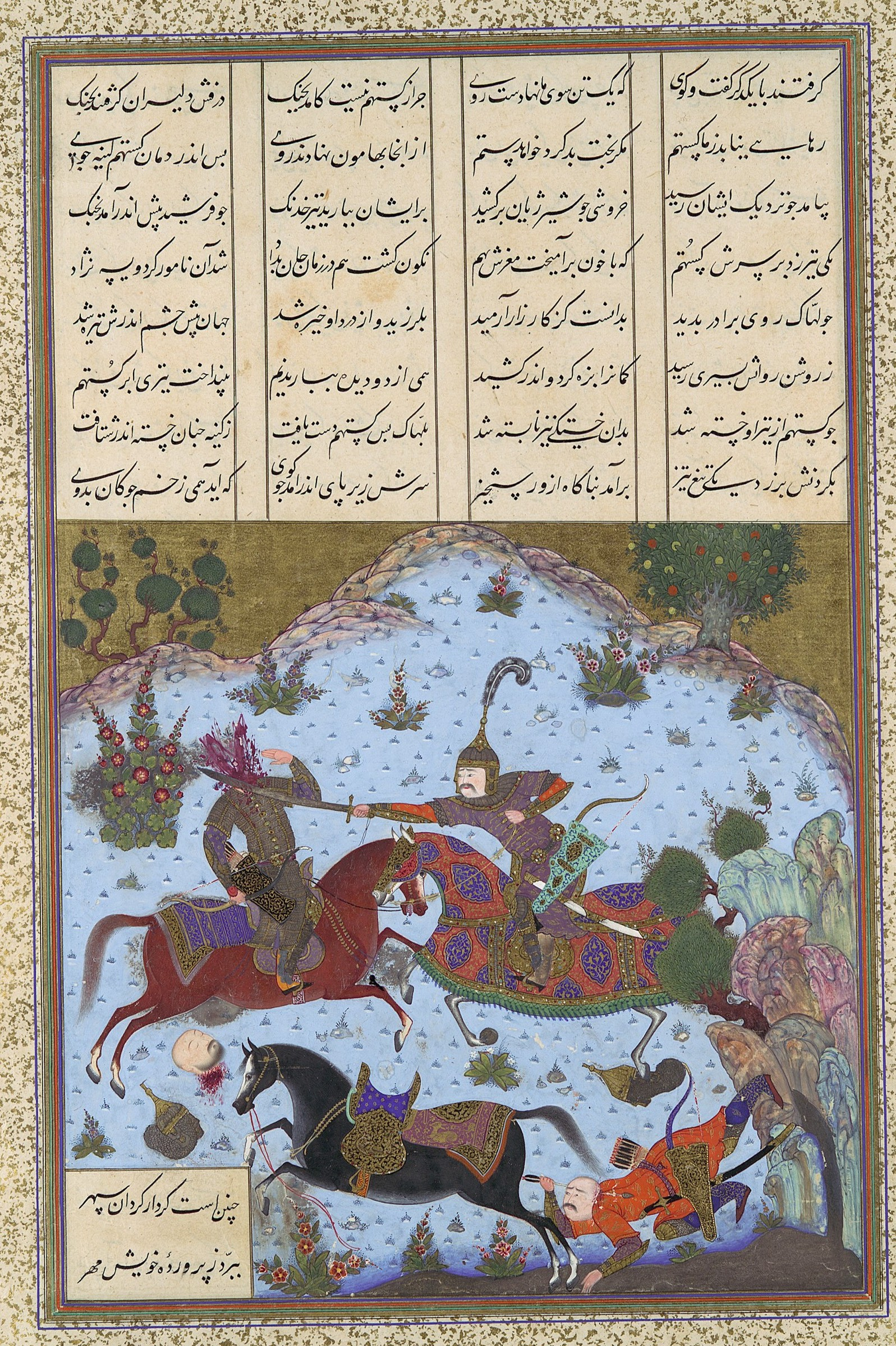 Lahhak and Farshidvard 12 Rokh the famous war between Iran& Turan